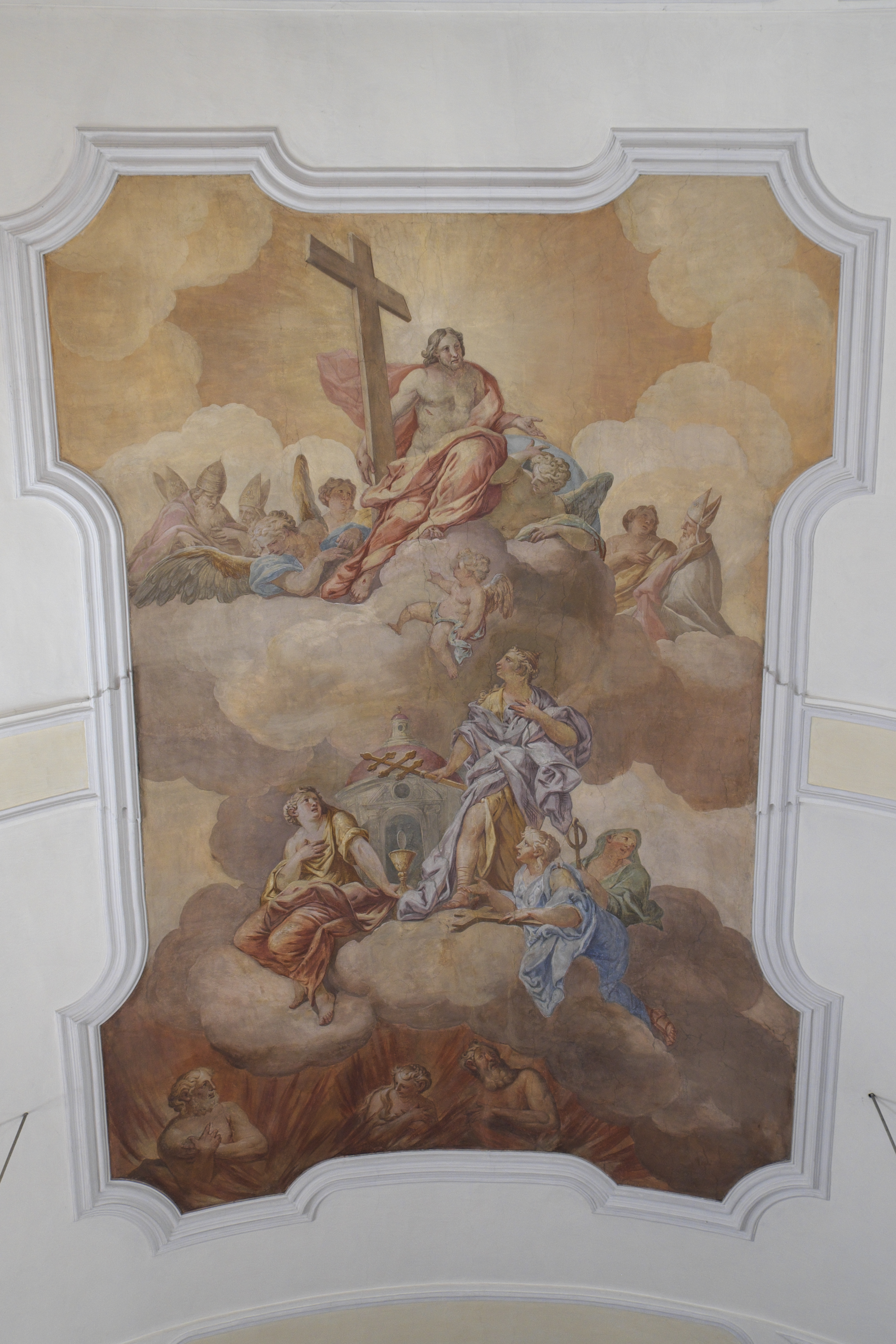 Katholische Pfarrkirche St. Valentin in Unterföhring im Landkreis München (Bayern/Deutschland), Deckenfresko im Langhaus von Nikolaus Gottfried Stuber, von 1718; Darstellung: Jesus mit Kreuz, Kirchenväter, göttliche Tugenden Glaube, Hoffnung, Liebe